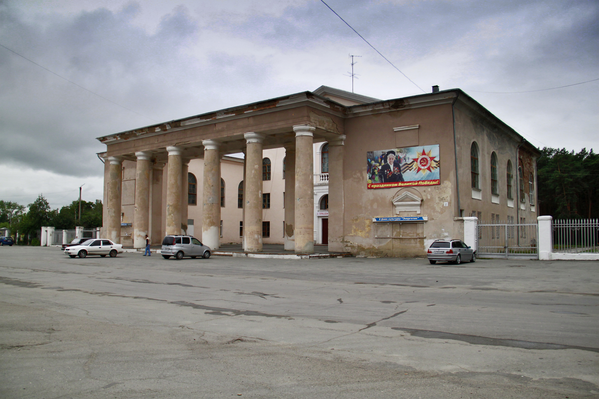 Южноуральский городской дом культуры